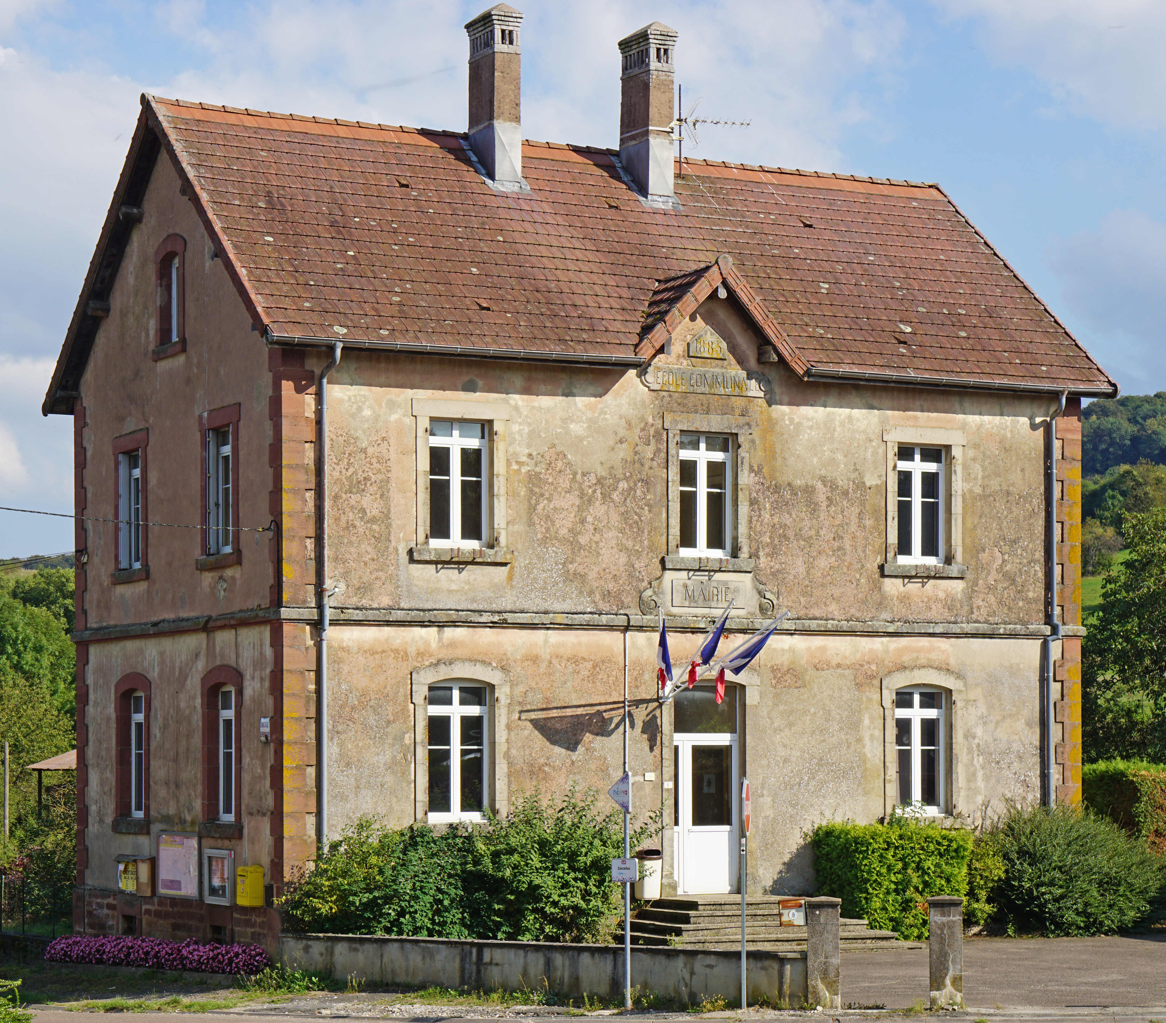 L'ancienne école-mairie de Corcelles (Saulnot) en Haute-Saône.